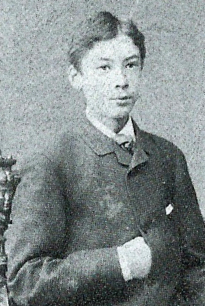 Philip Kleintjes (1867-1938), detail van een foto waarop ook zijn halfbroers Jan en Leo staan afgebeeld